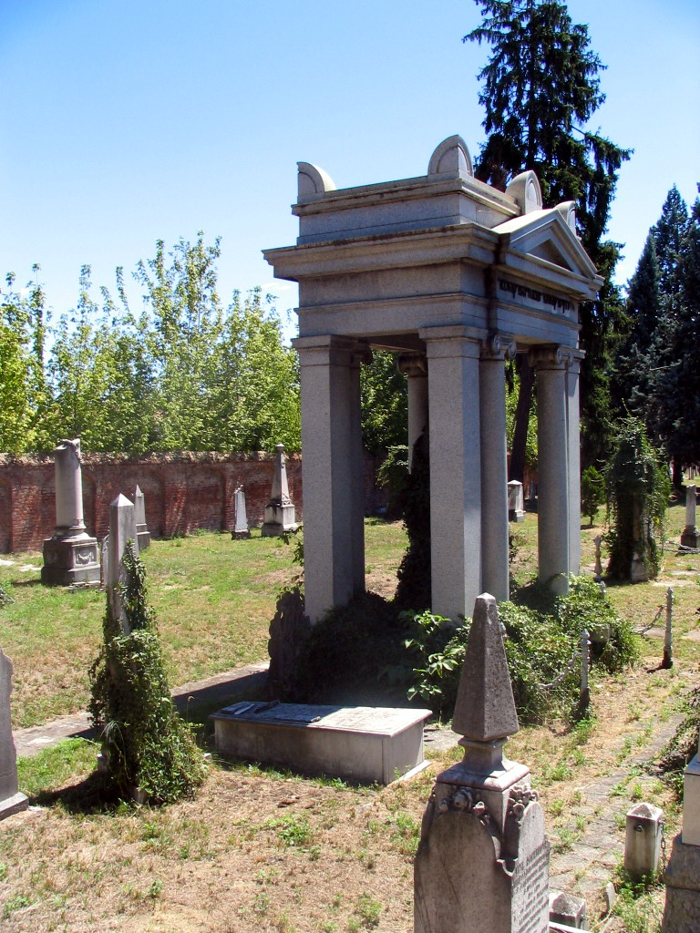 Cimitero Ebraico di Asti , foto fatta da me faberh 2006